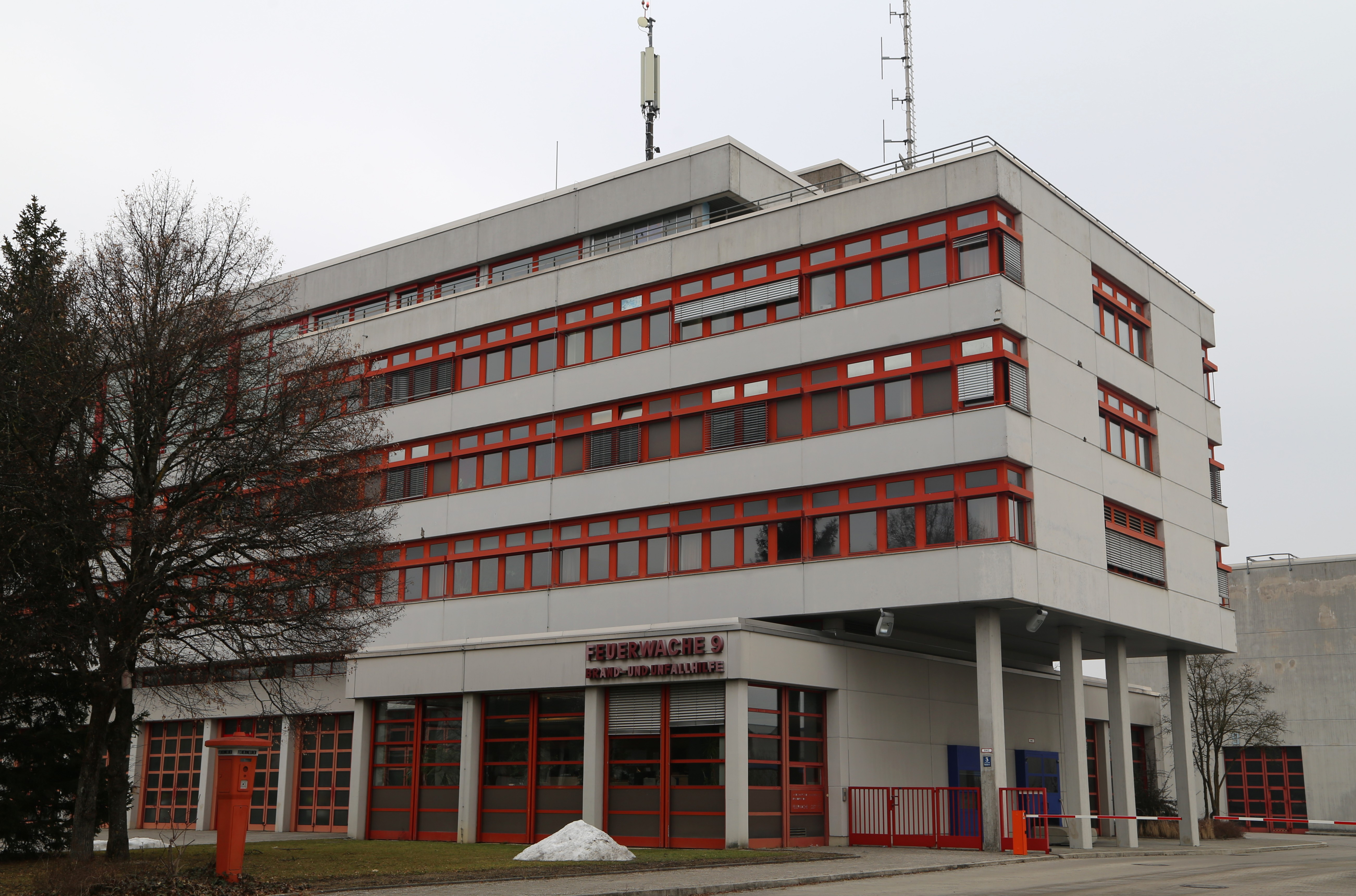 Feuerwache 9 Neuperlach; Heidestraße 3, München